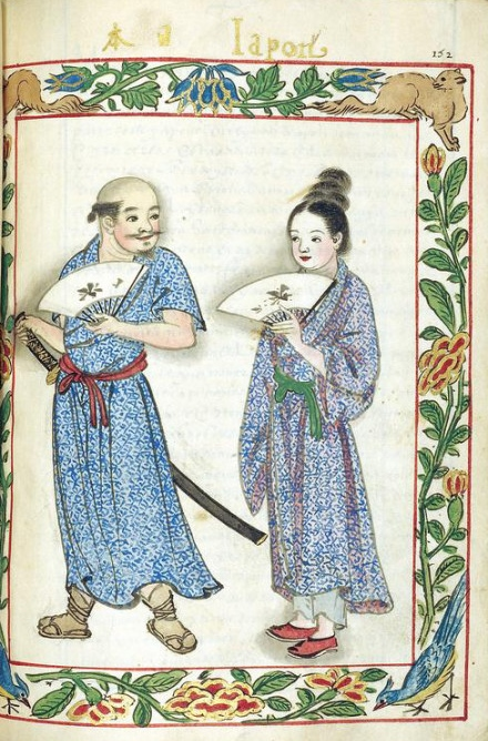 中文（香港）: 1595年的日本人